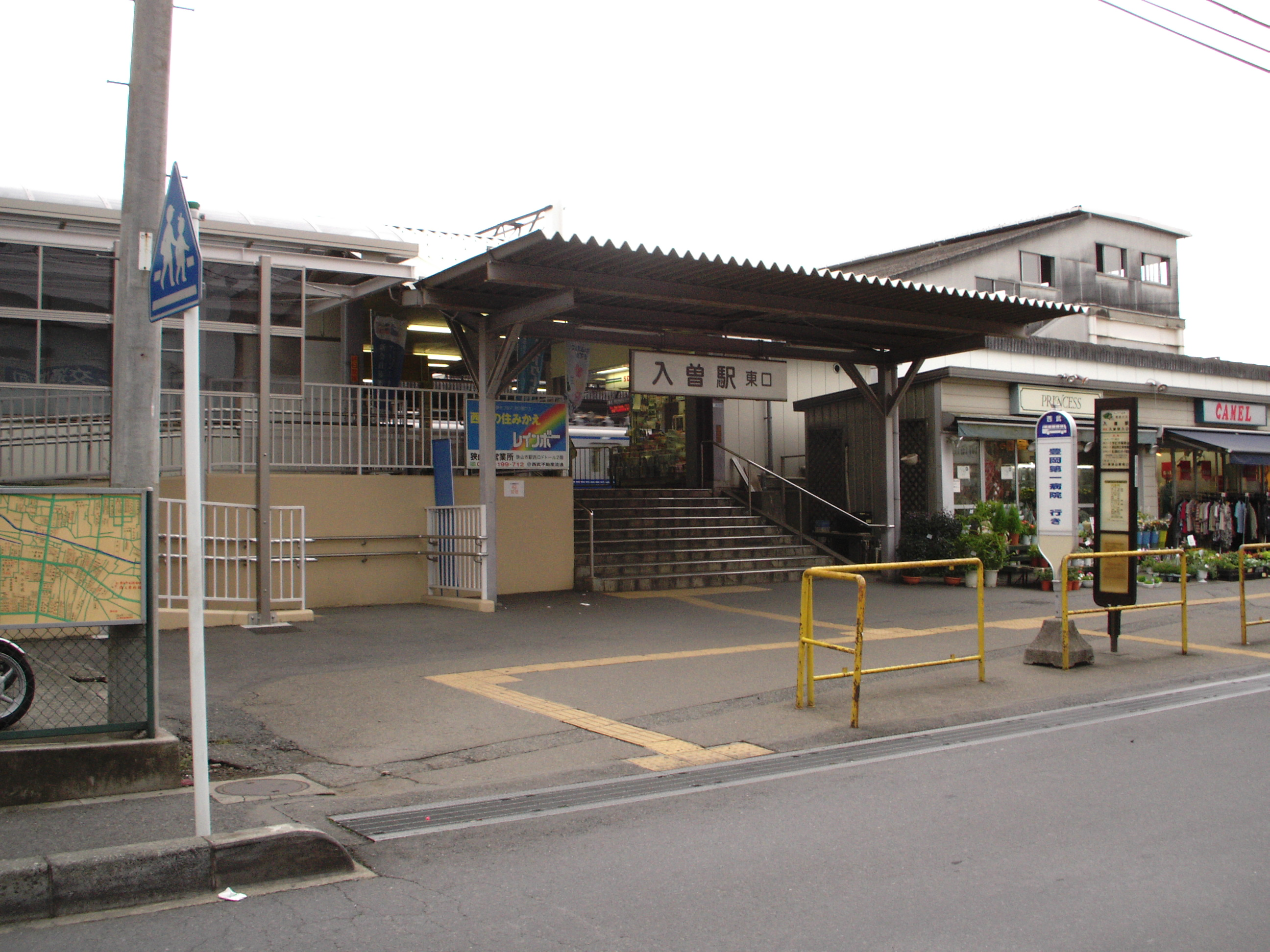 入曽駅東口